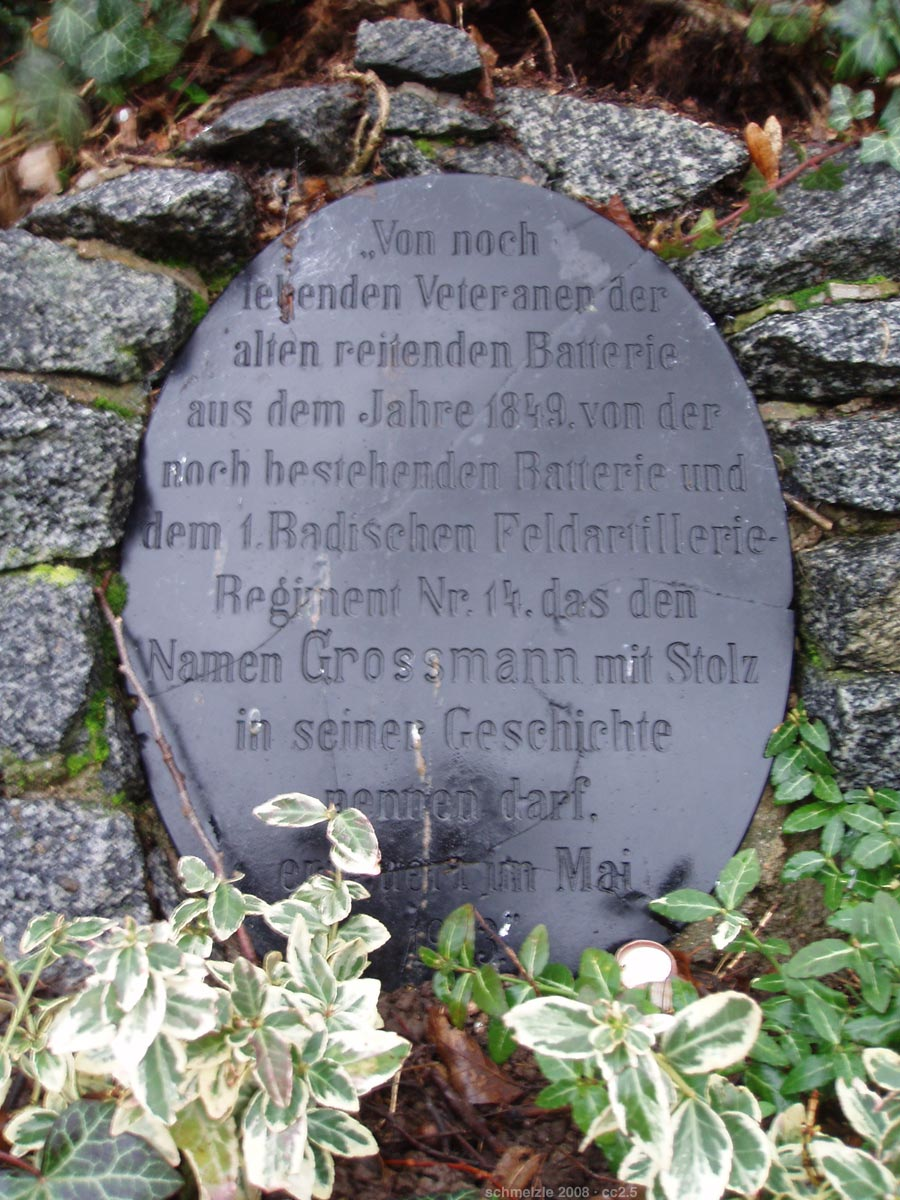 Erinnerungstafel für den badischen Hauptmann Grossmann auf dem Friedhof in Bad Rappenau-Bonfeld. Grossmann hat sich 1849 aus Schmach über die Auflösung seiner von Baden ins württembergische Bonfeld geflüchteten Einheit im Garten des Unteren Schlosses erschossen. Auf der Tafel steht „Von noch lebenden Veteranen der alten reitenden Batterie aus dem Jahre 1849, von der noch bestehenden Batterie und dem 1. Badischen Feldartillerie-Regiment Nr. 14, das den Namen Grossmann mit Stolz in seiner Geschichte nennen darf. / erneuert im Mai 1903“